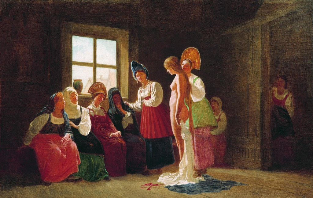 Г. Г. Мясоедов - "Смотрины невесты" (вторая половина 19 века) Государственный Русский музей, Санкт-Петербург